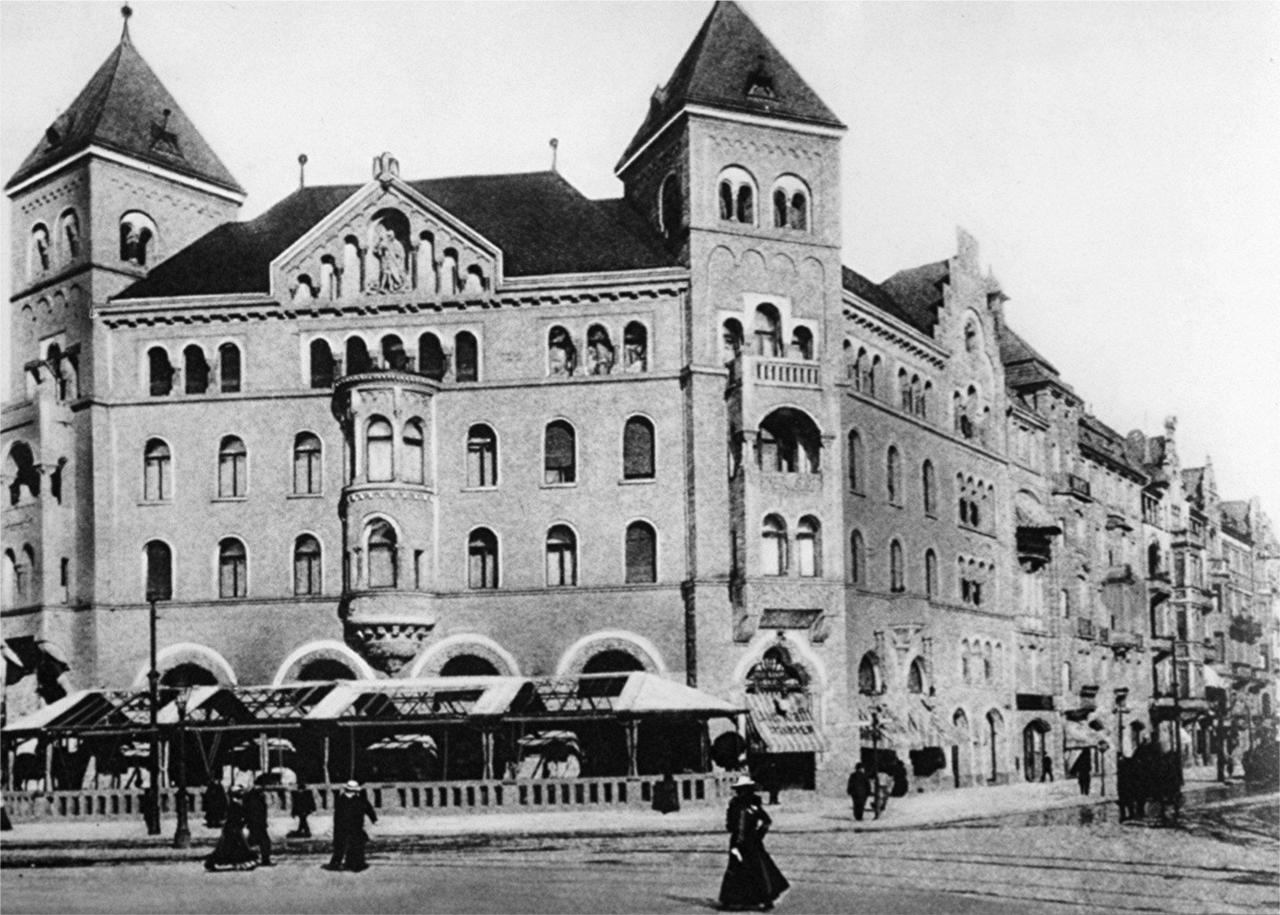 „Neues Romanisches Haus“, auch „Romanisches Haus II“, in Berlin-Charlottenburg, am Auguste-Viktoria-Platz (Breitscheidplatz) östlich der Kaiser-Wilhelm-Gedächtnis-Kirche; erbaut 1900-1901 nach Entwurf des Architekten Franz Schwechten; Aufnahme wohl kurz nach der Fertigstellung